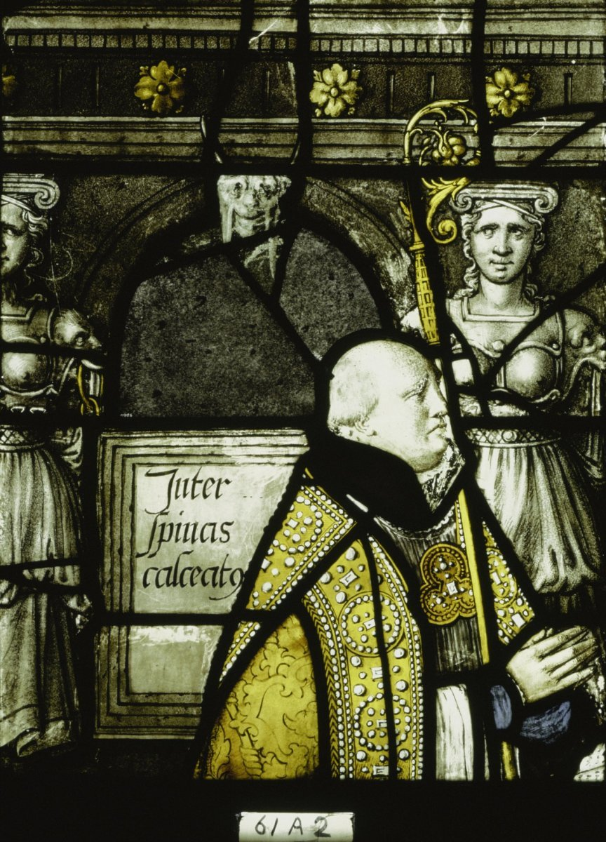 Sint Janskerk: interieur, glas in loodraam NR. 61, detail A 2